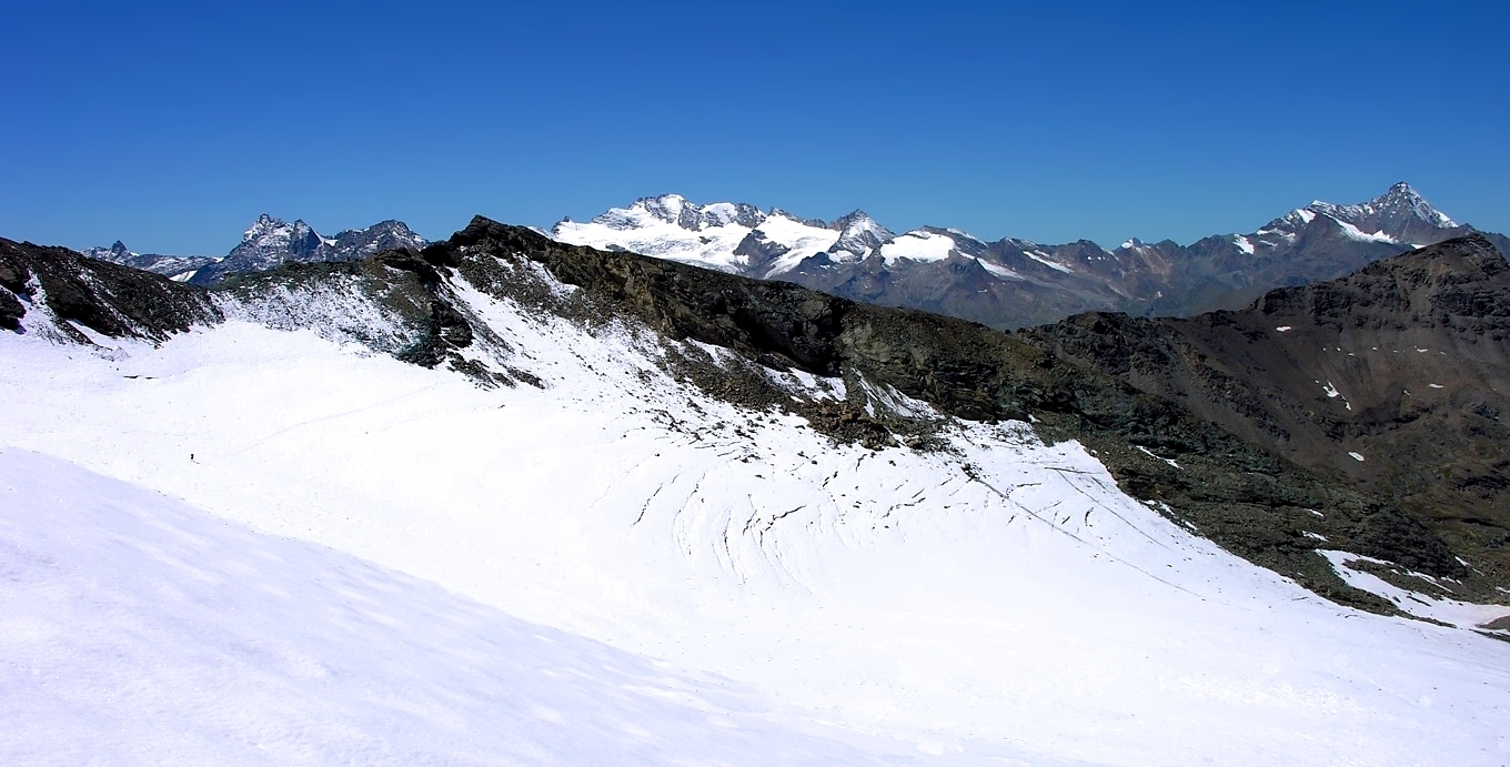 Il massiccio del Gran Paradiso dal Ghiacciaio del Tessonet - Alpi Graie - Italy